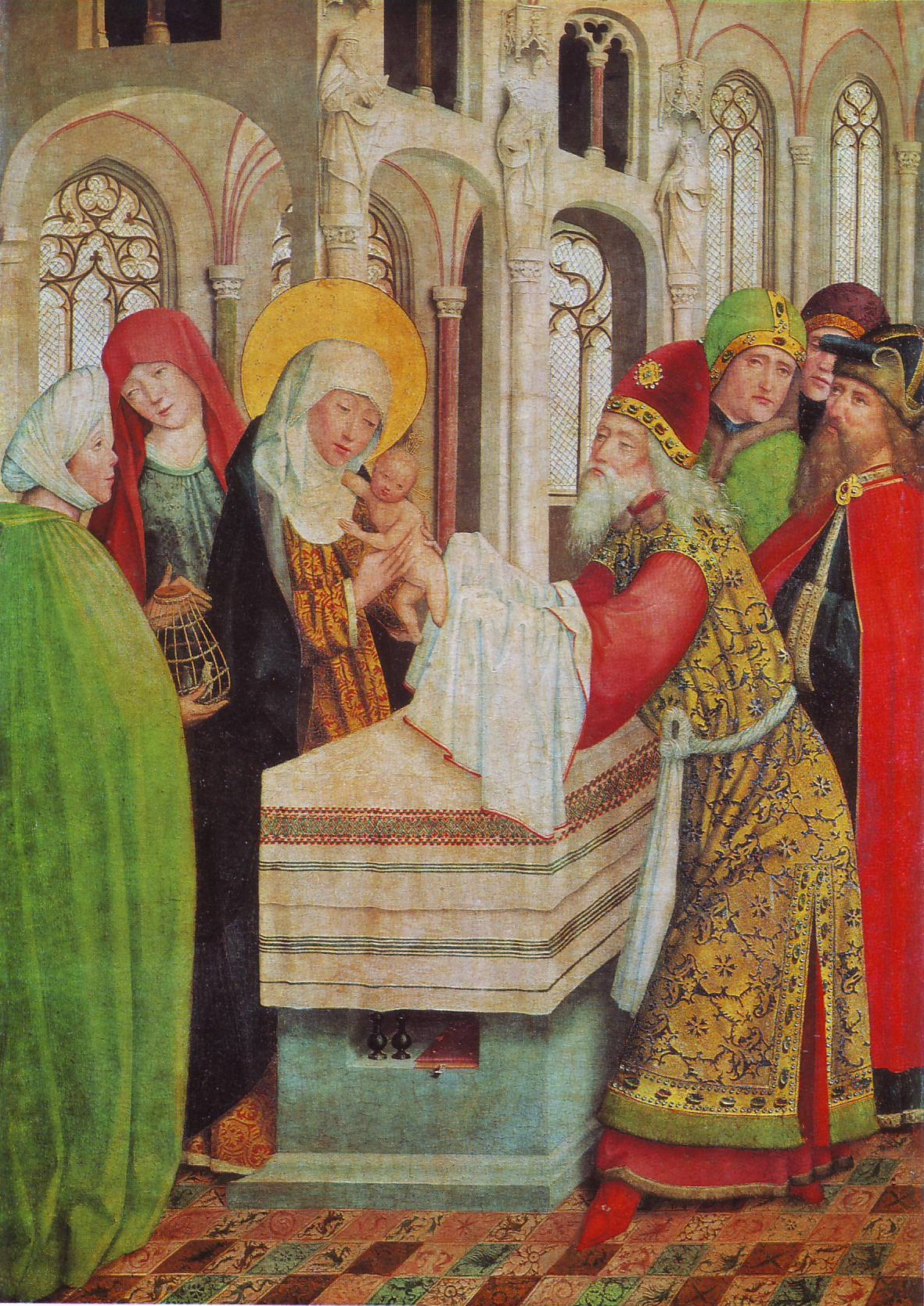 Darbringung im Tempel, Liesborner Altar, National Gallery London